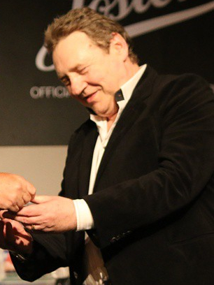 John Gale nach dem Gewinn eines Bracelets der World Series of Poker 2015